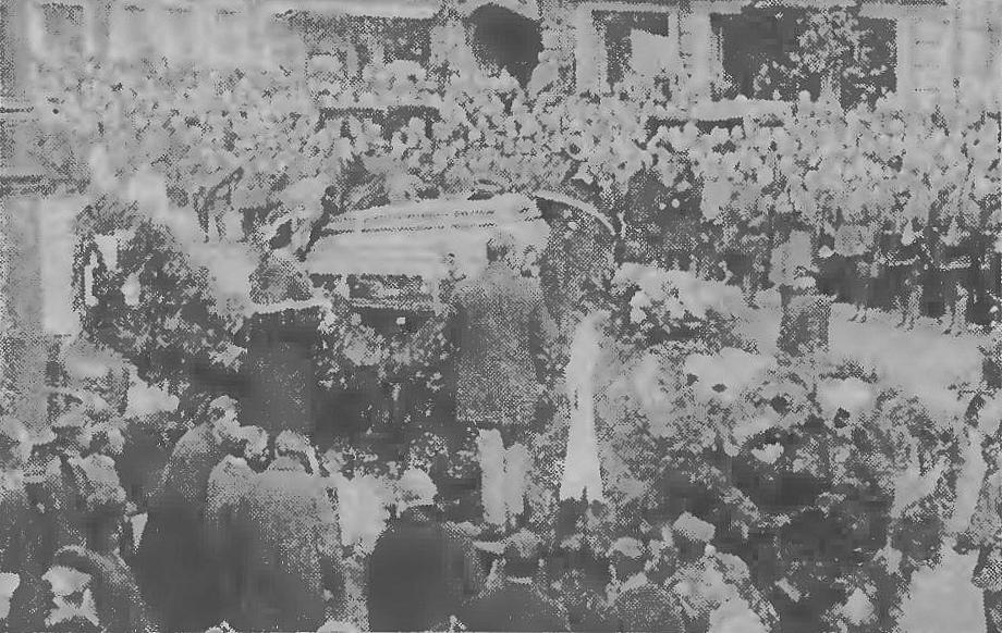 Pogrzeb Zdzisława Zych-Płodowskiego, który zginął w katastrofie 11 maja 1927